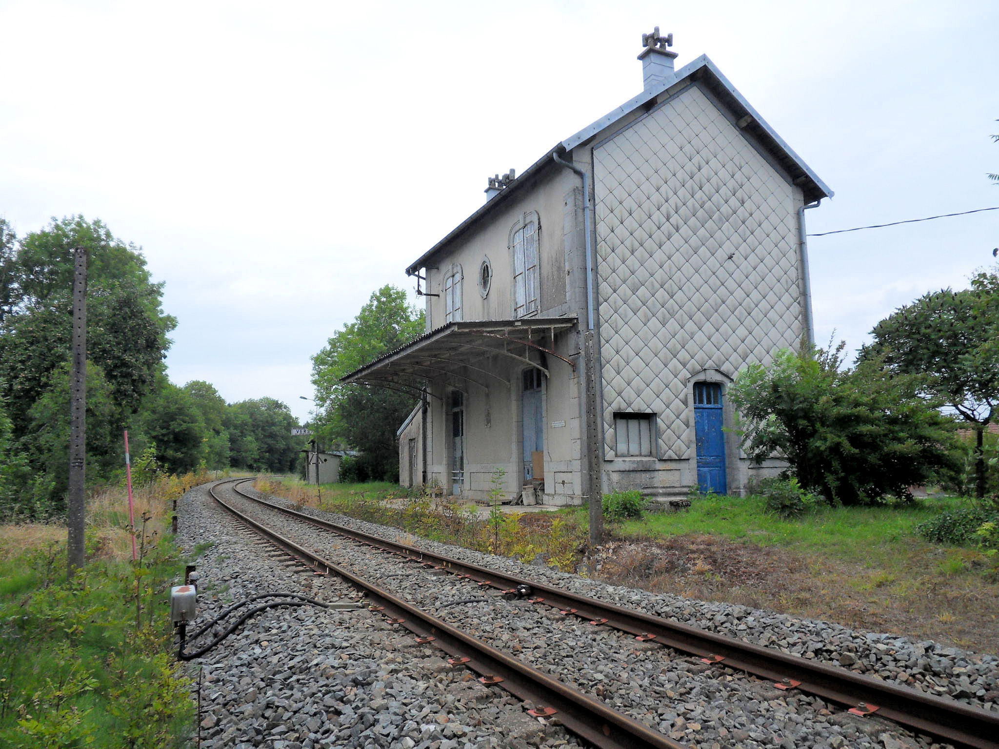 Gare de Vers-en-Montagne. L'ancien bâtiment voyageurs.